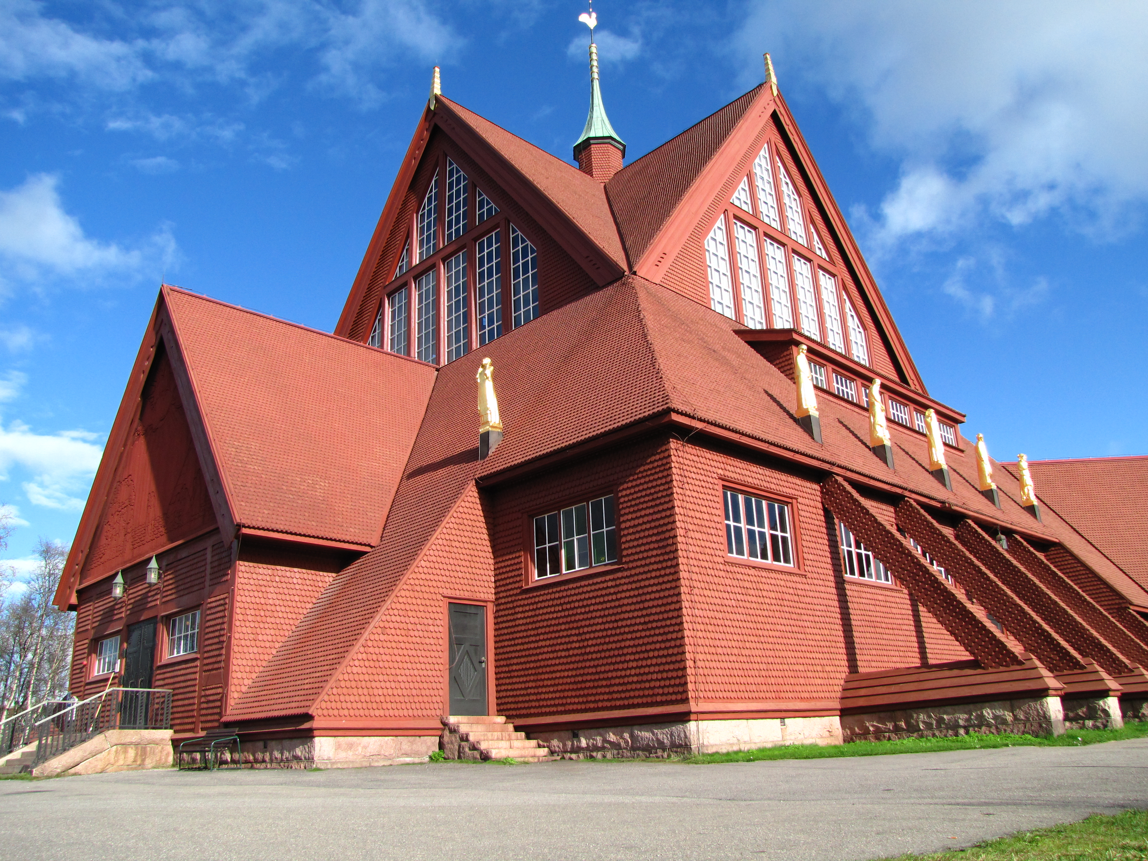 Kiruna kyrka, framröstad som Sveriges vackraste byggnad 2001.